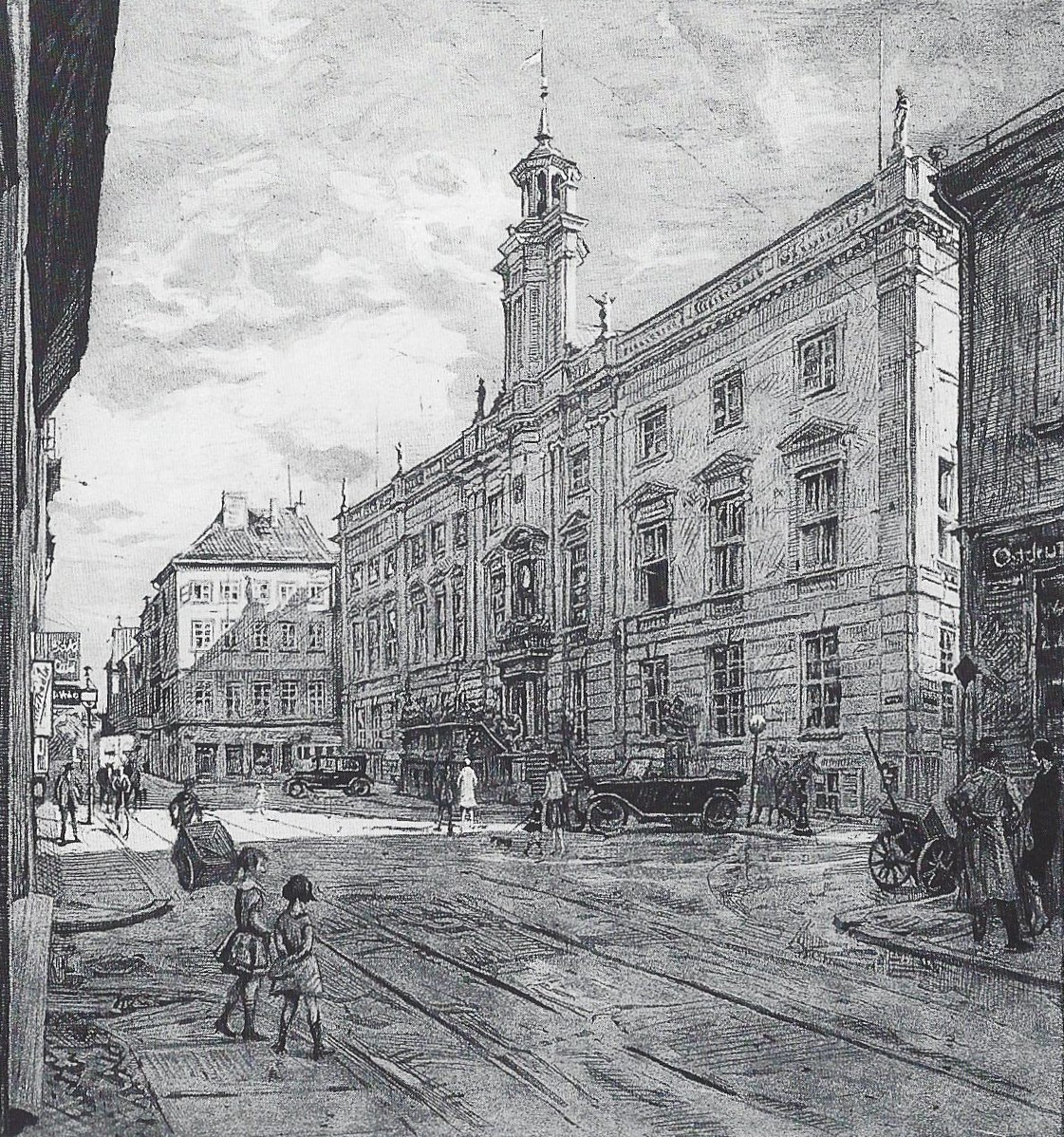 Kneiphöfisches Rathaus in Königsberg, Aquatinta